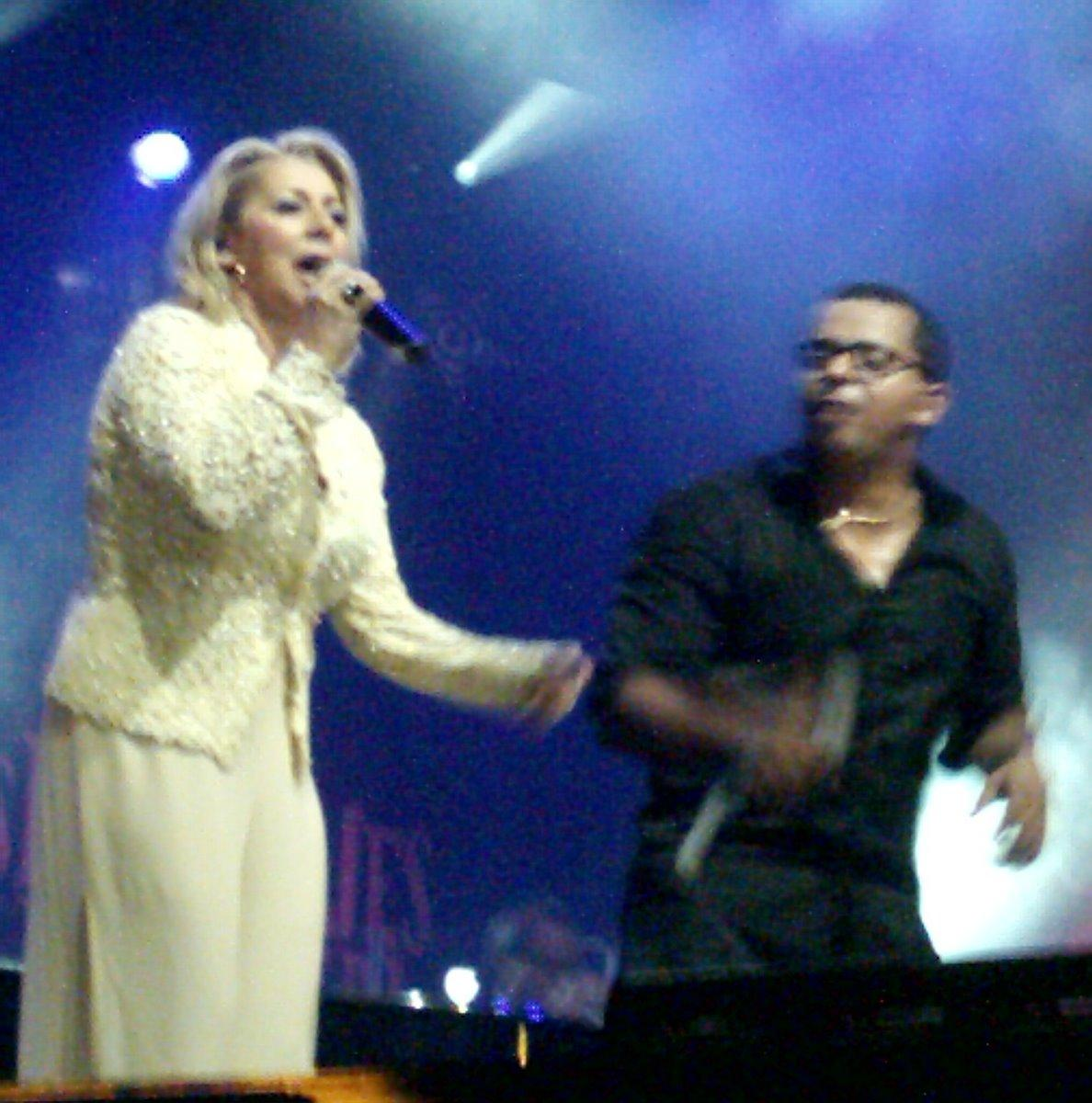 Patsy Gallant invitée au spectacle de Gregory Charles aux FrancoFolies de Montréal